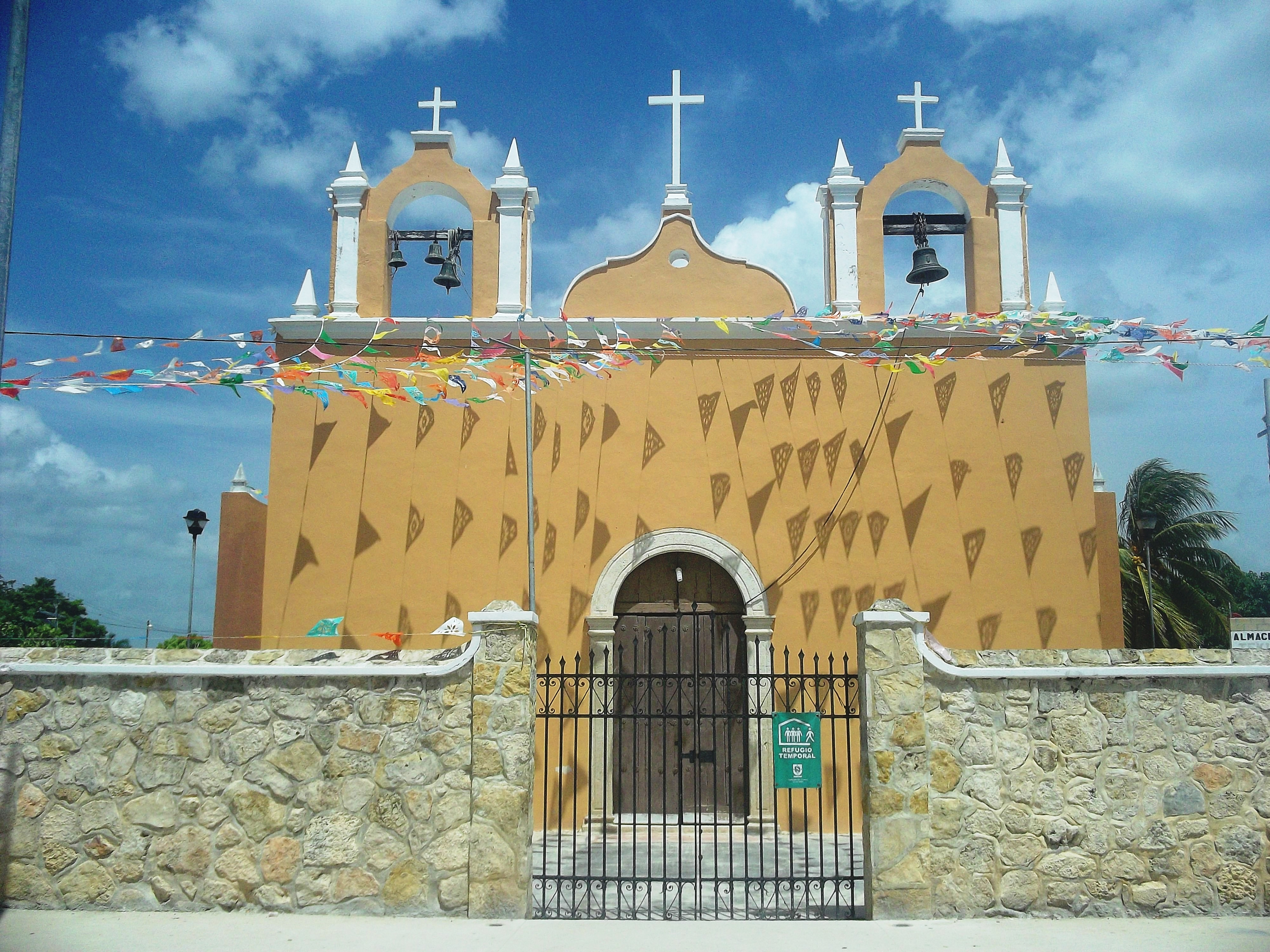 Iglesia de Celestún, Yucatán.